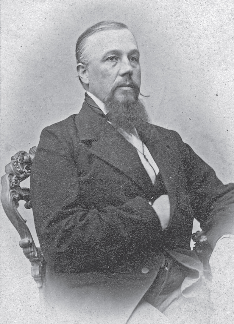 Беларуская (тарашкевіца): Партрэт Карнэля Пялікшы (Karnel Palikša)